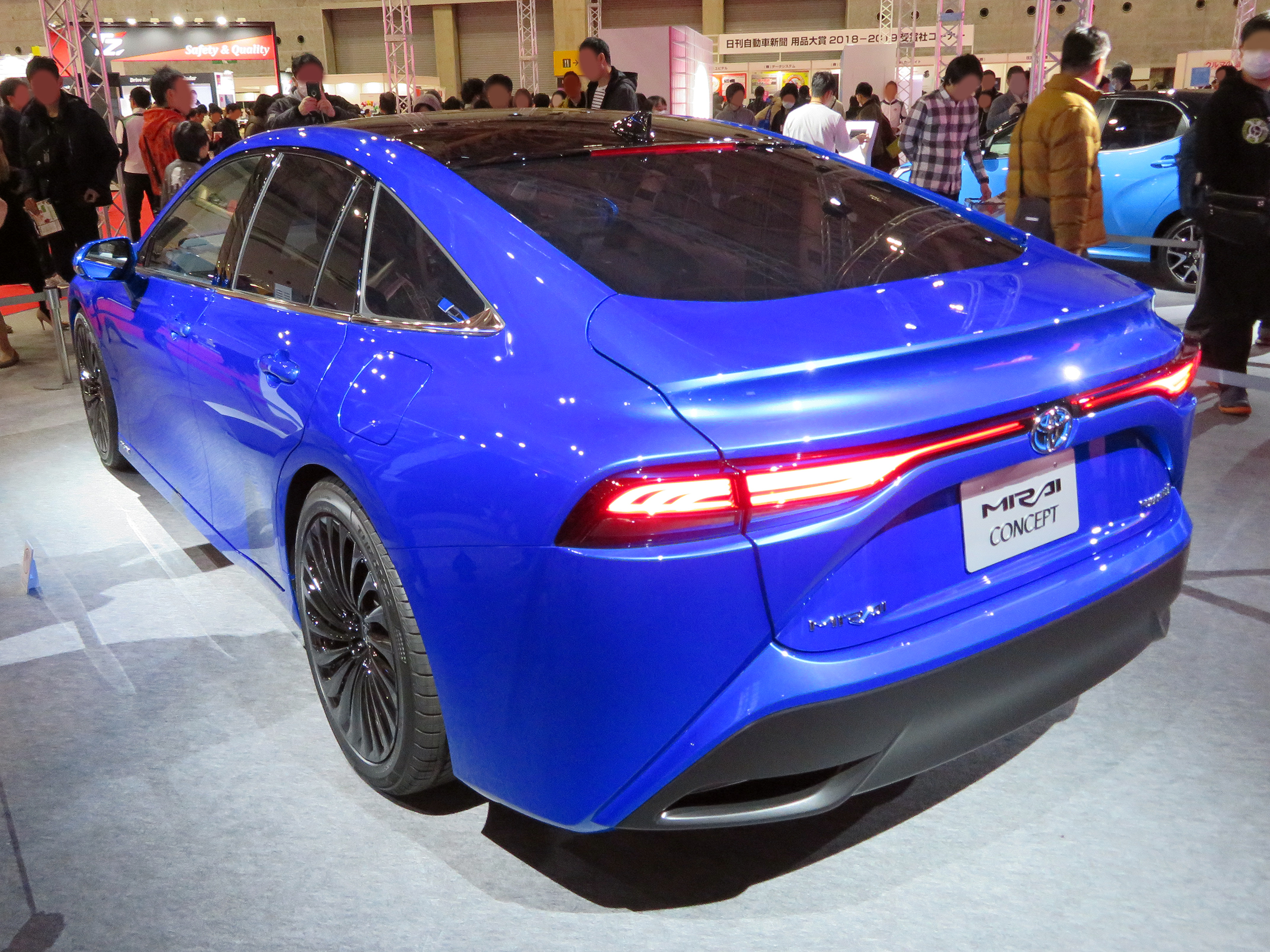 大阪モーターショー2019に於いてトヨタ・MIRAIコンセプトを撮影。